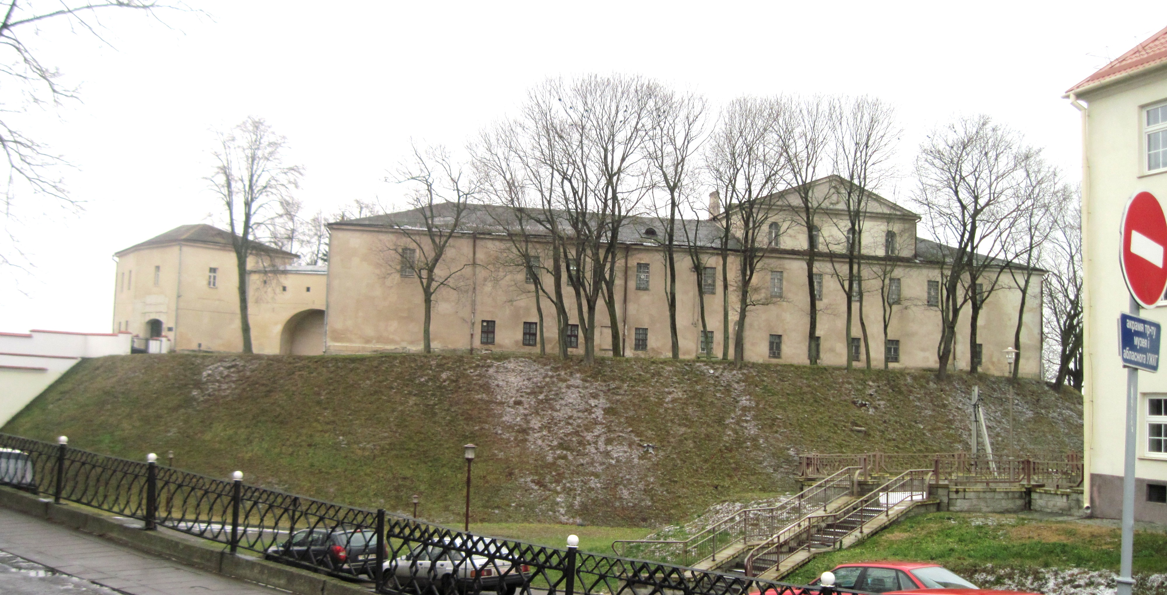 Беларуская (тарашкевіца): Фота Старога Замка ў Гродна